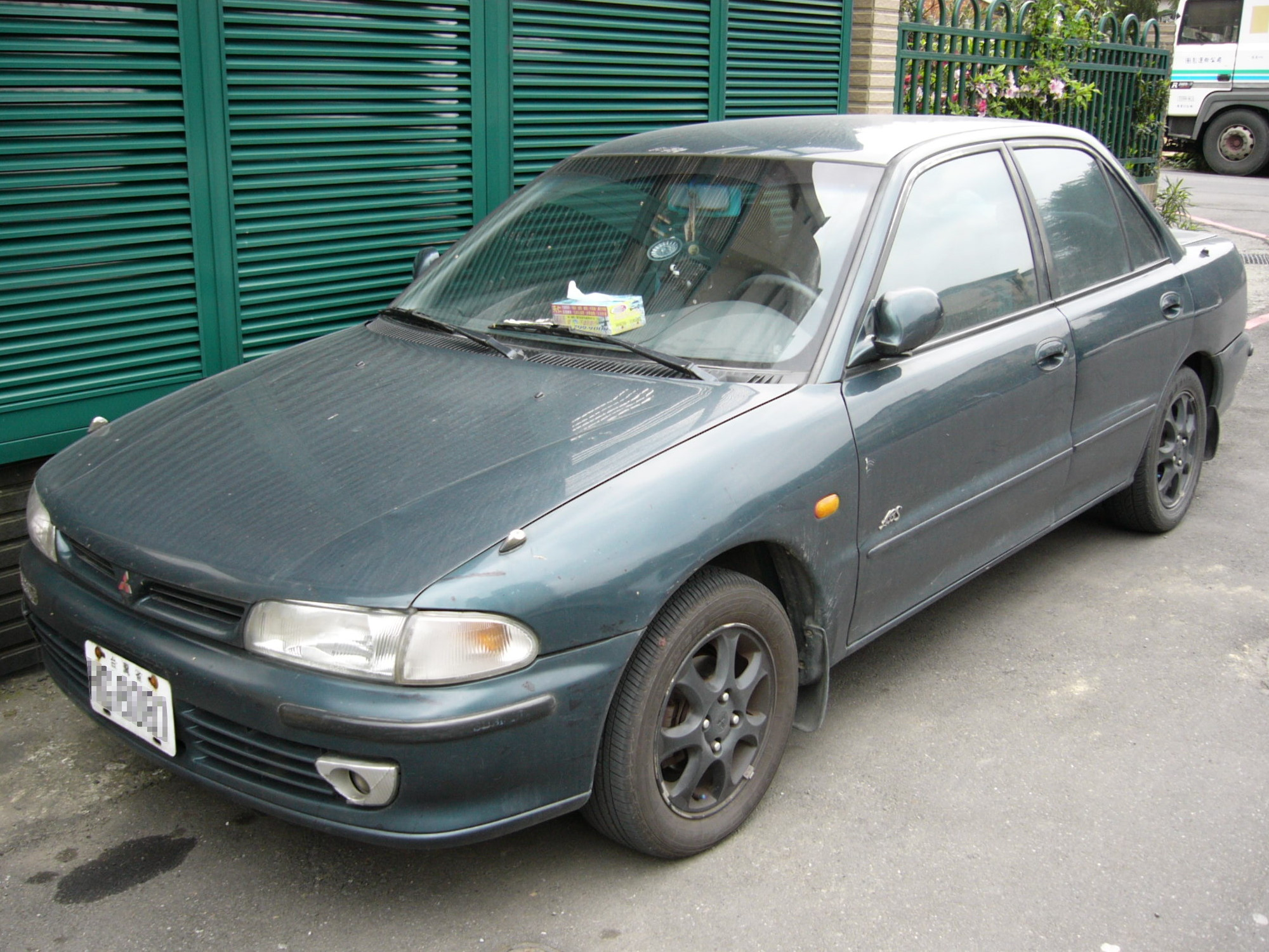 中華汽車製造的第五代（臺灣第一代）三菱菱帥SEi轎車左前方外觀